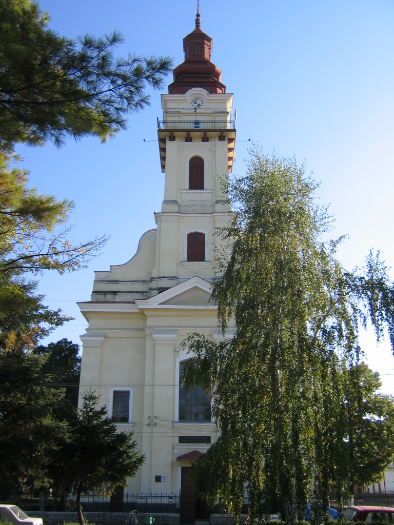 Biserica evanghelica Nadlac